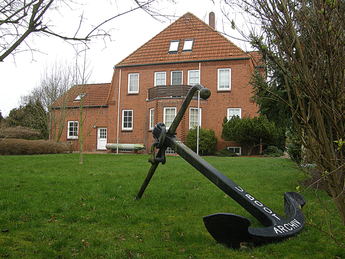 Das U-Boot Archiv in Cuxhaven Altenbruch